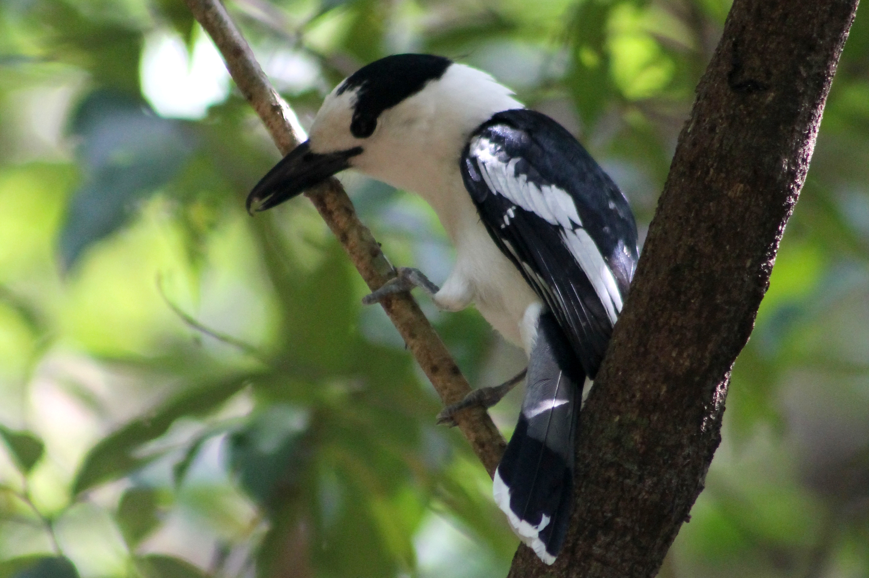 Haaksnavelvanga in Tsingy de Bemaraha